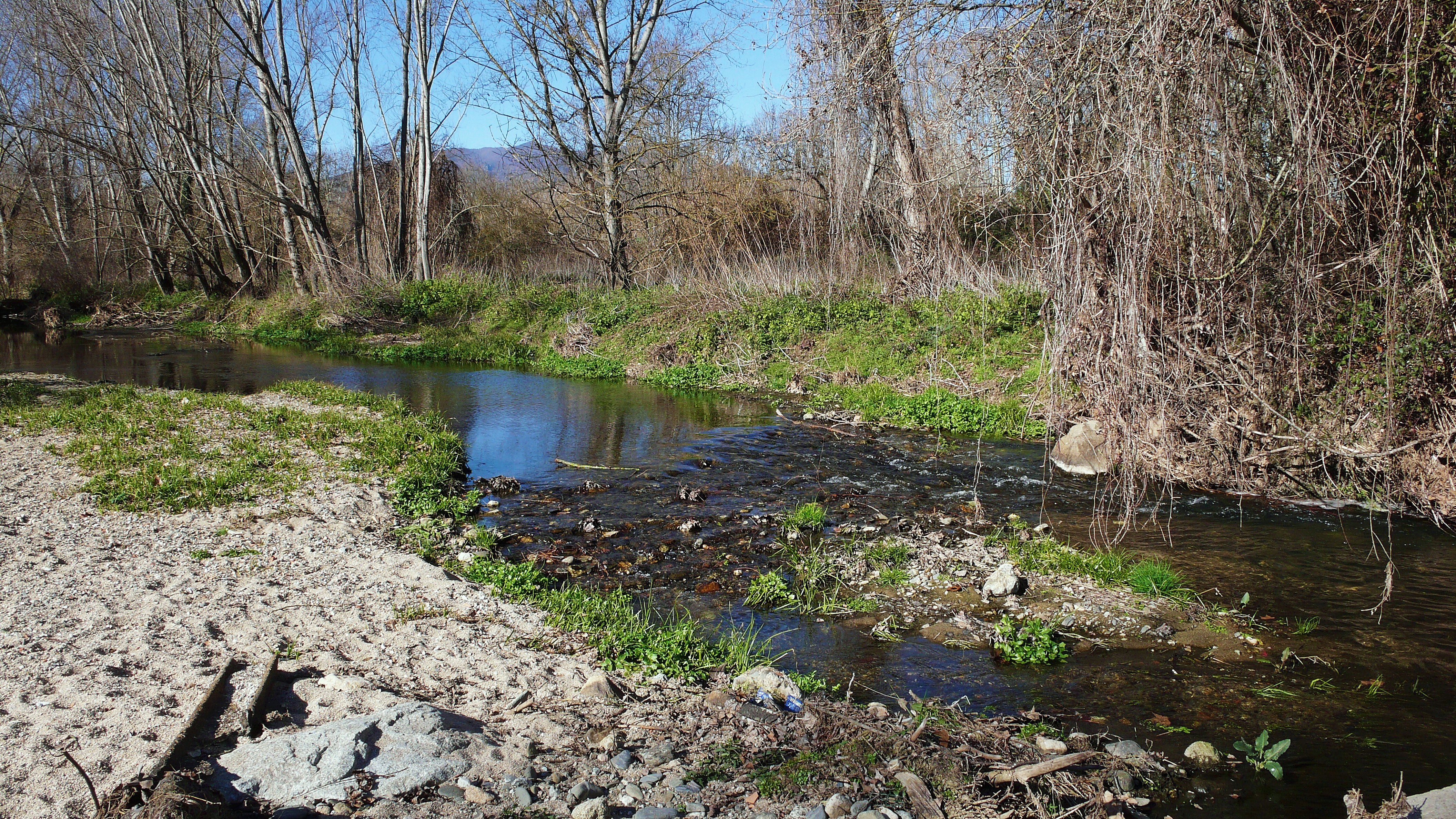 valles oriental-cataluña